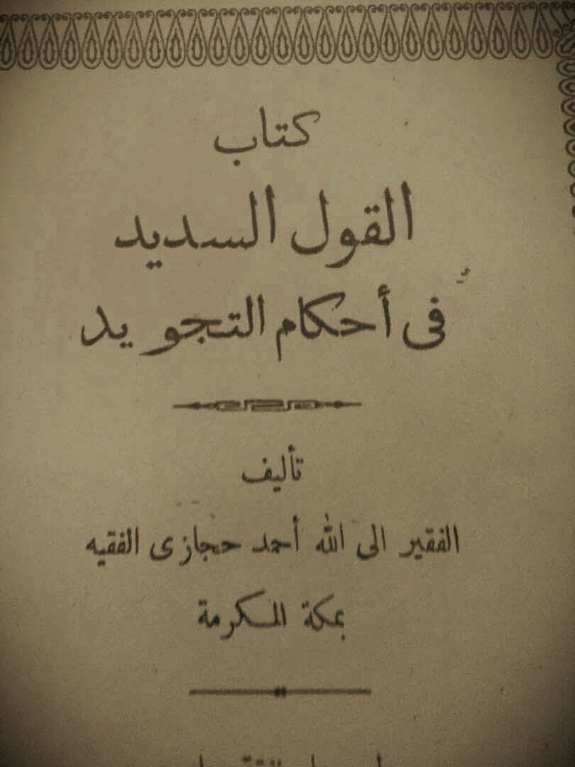 Kitab Al Qaul As Sadid